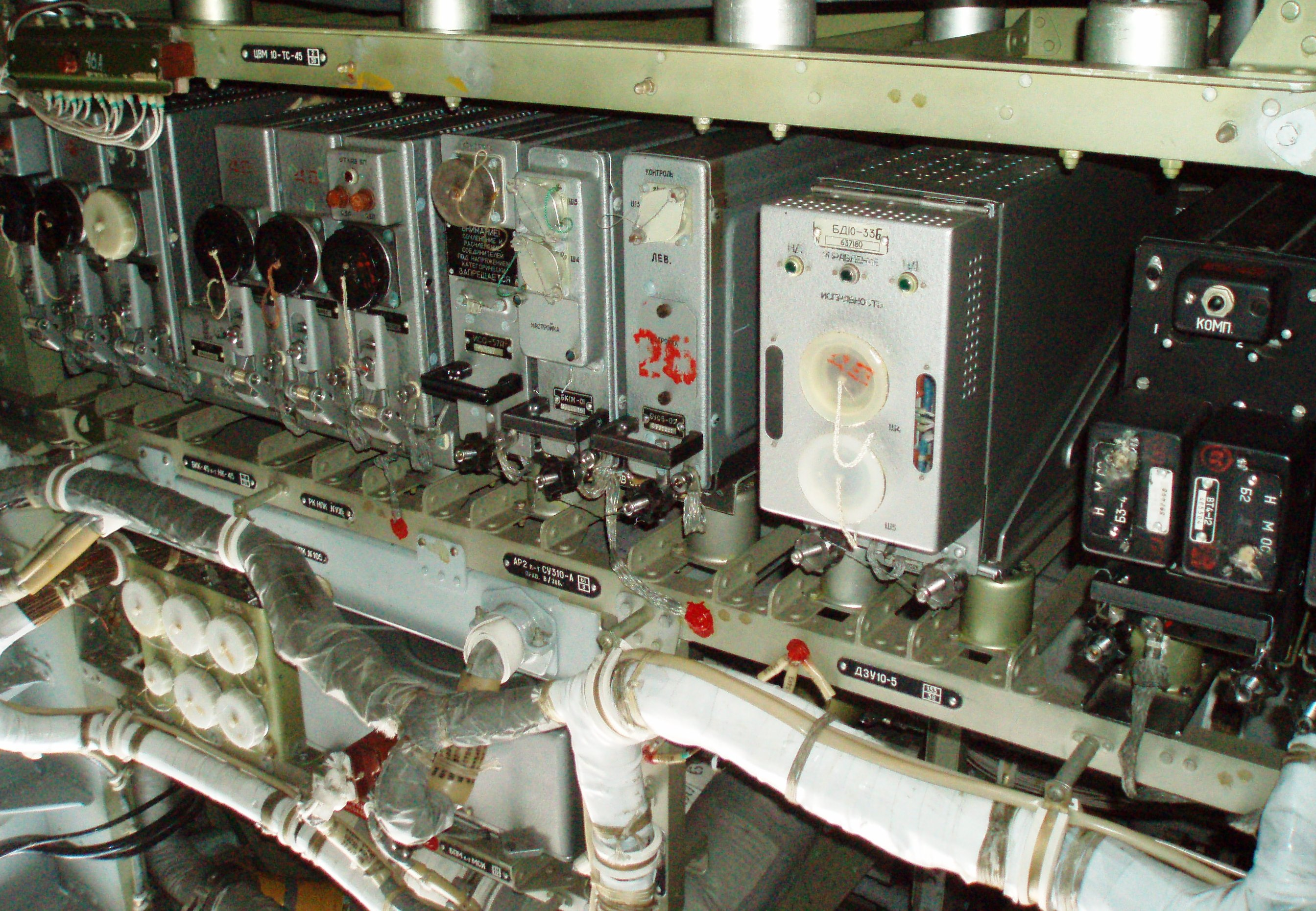 БКК-45, ДЗУ-10-5, Суз-10А, БПМ